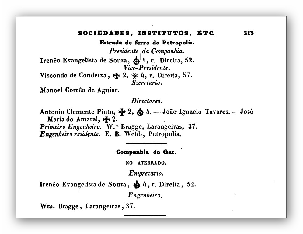 Compañia de Gas y ferrocarril de Petropolis